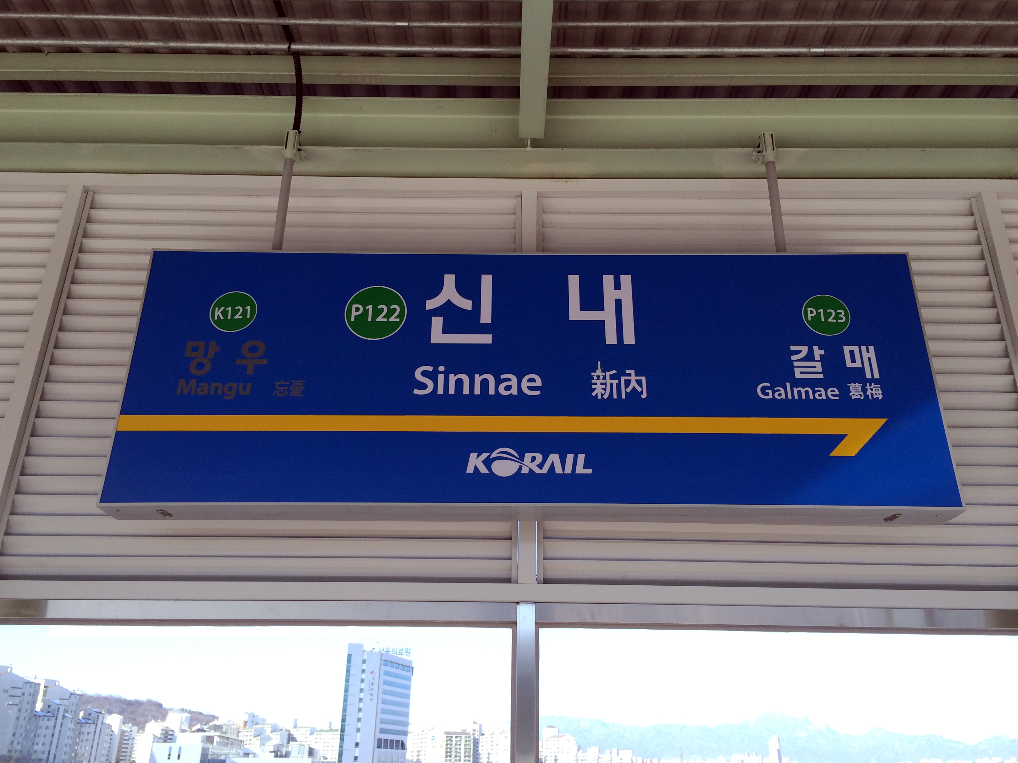 신내역 역명판